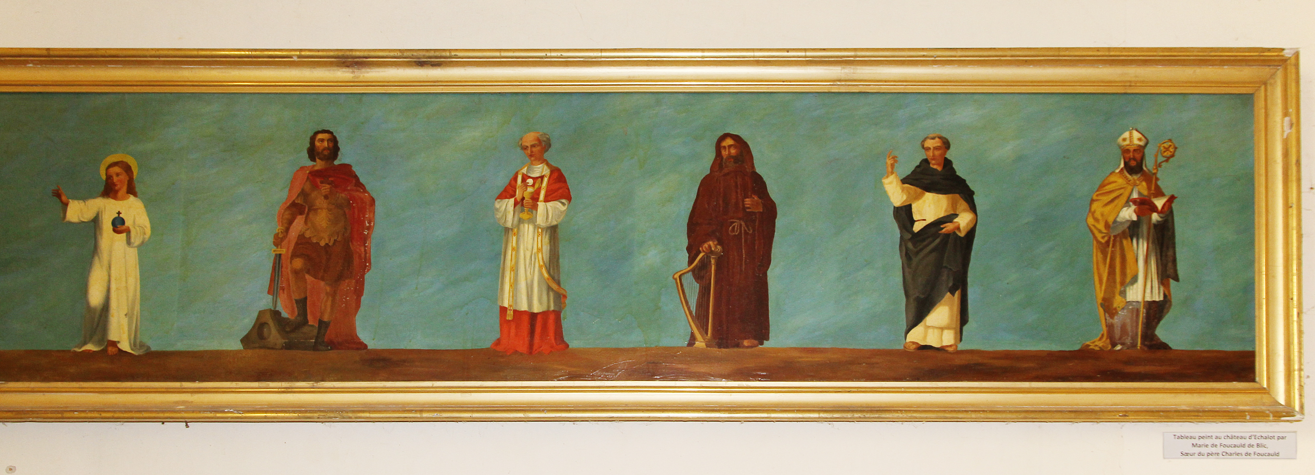 Peintures de Marie de Foucault de Blic dans l'église d'Échalot